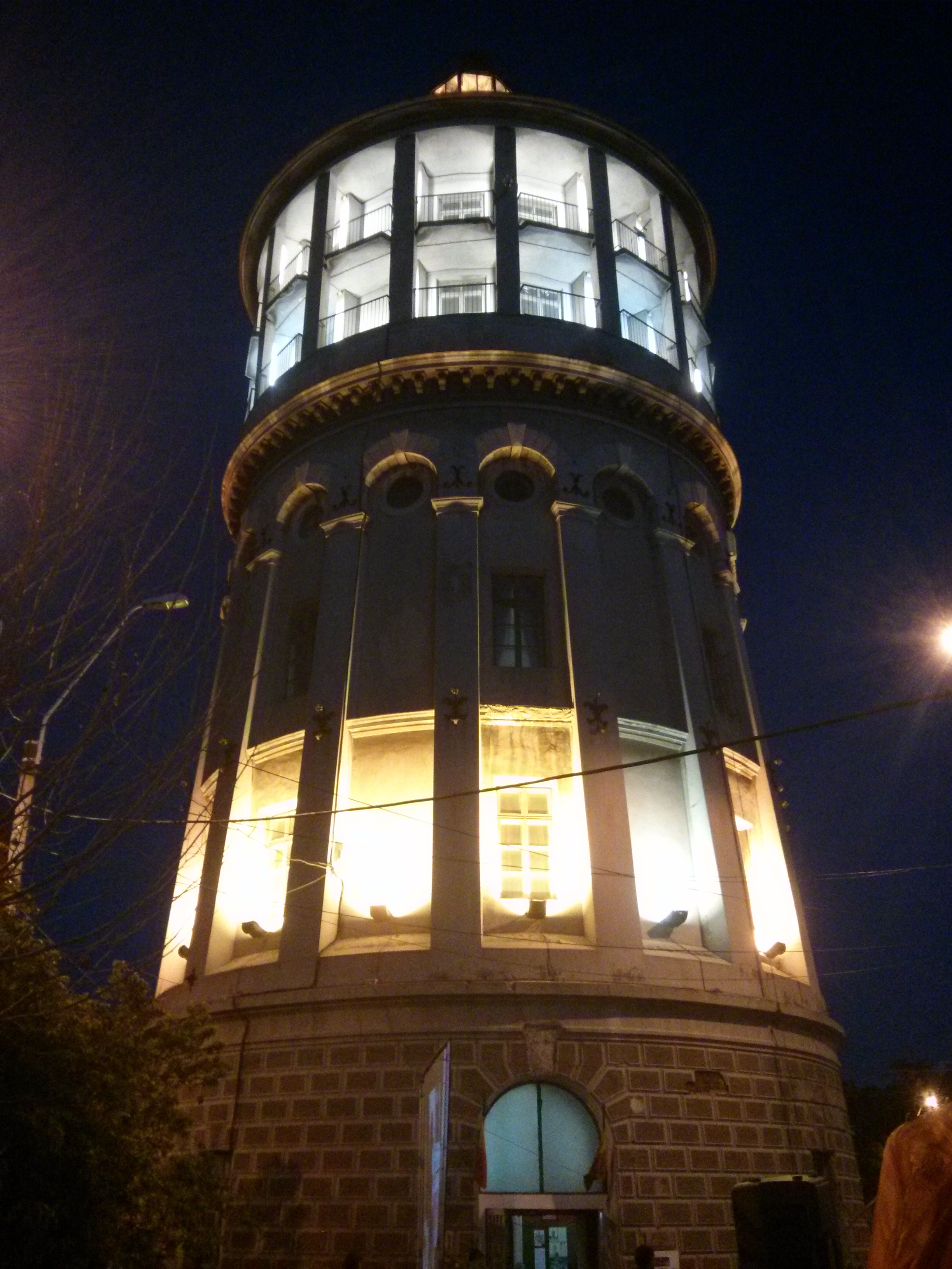 Foișorul de Foc noaptea